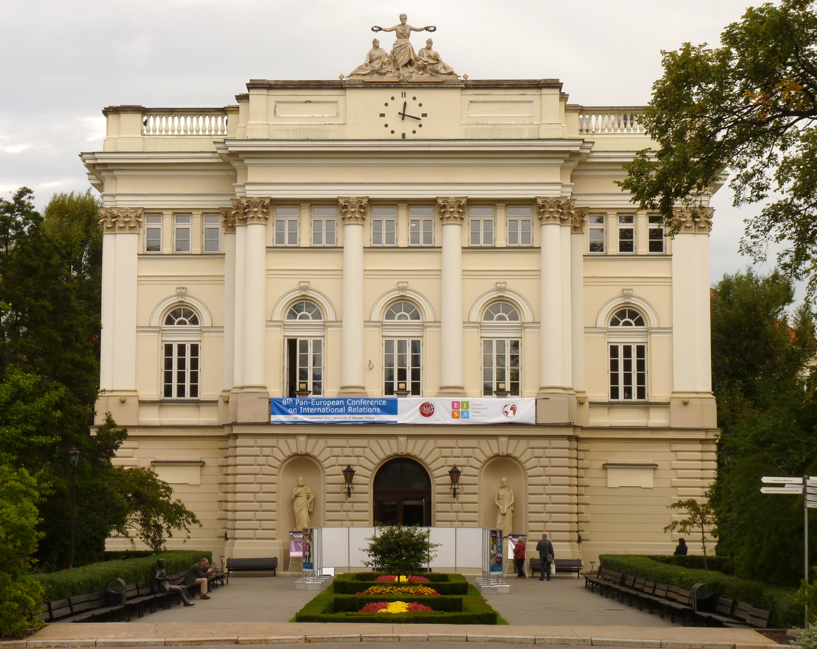 Warszawa, Biblioteka Uniwersytecka, 1891-1894